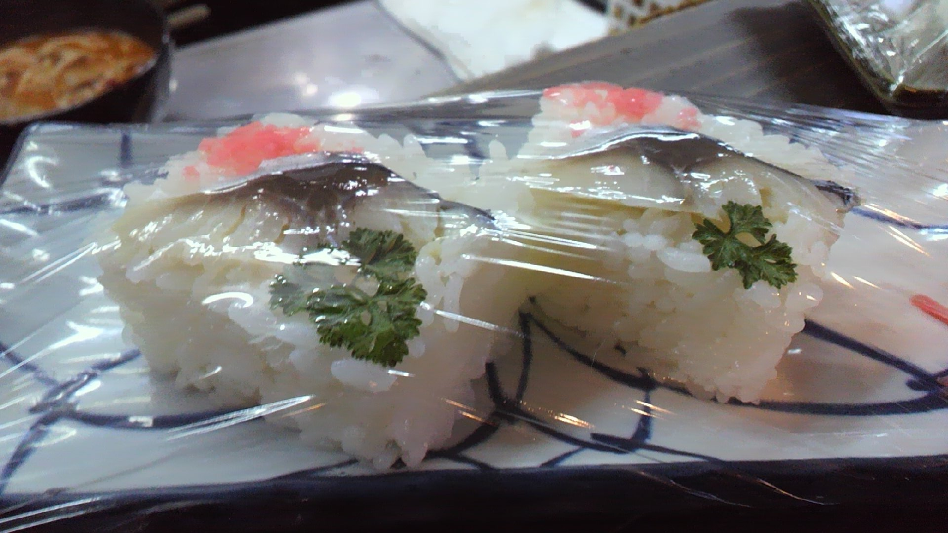 広島県安芸高田市「神楽門前湯治村」にて